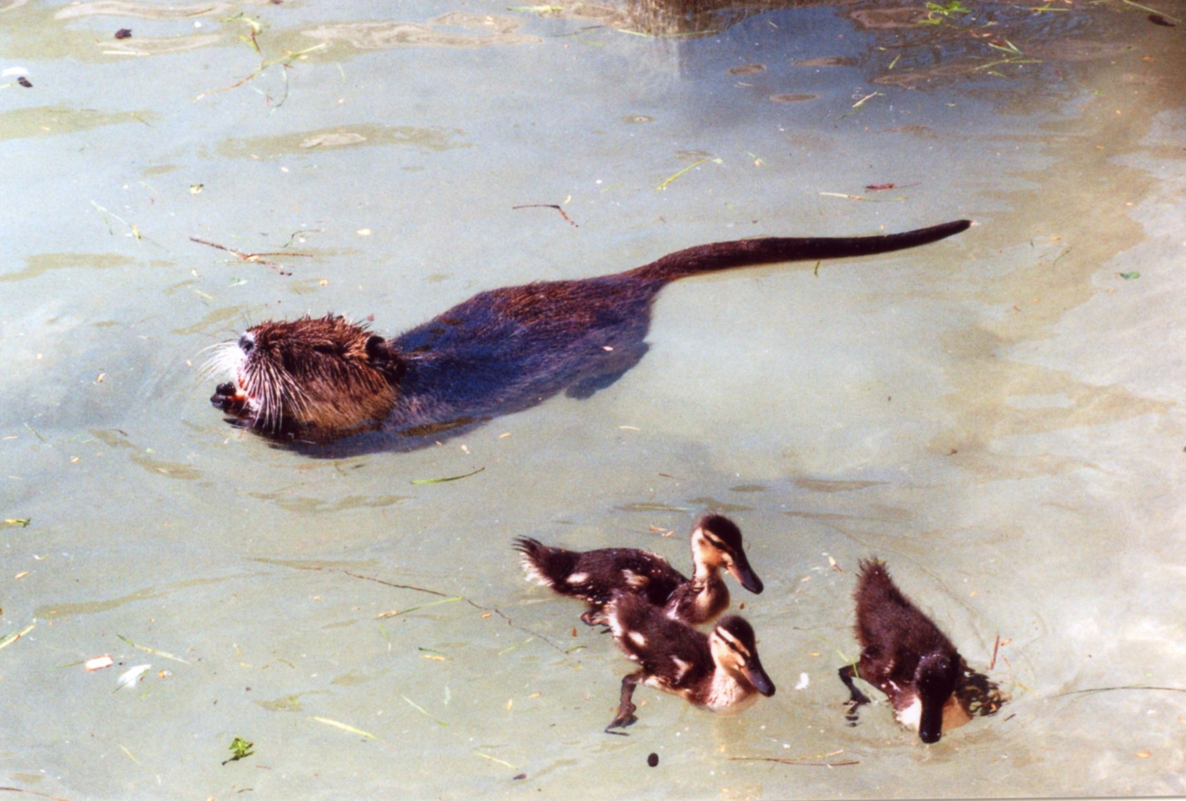 Nutria mit kleinen Enten im Wildpark Poing